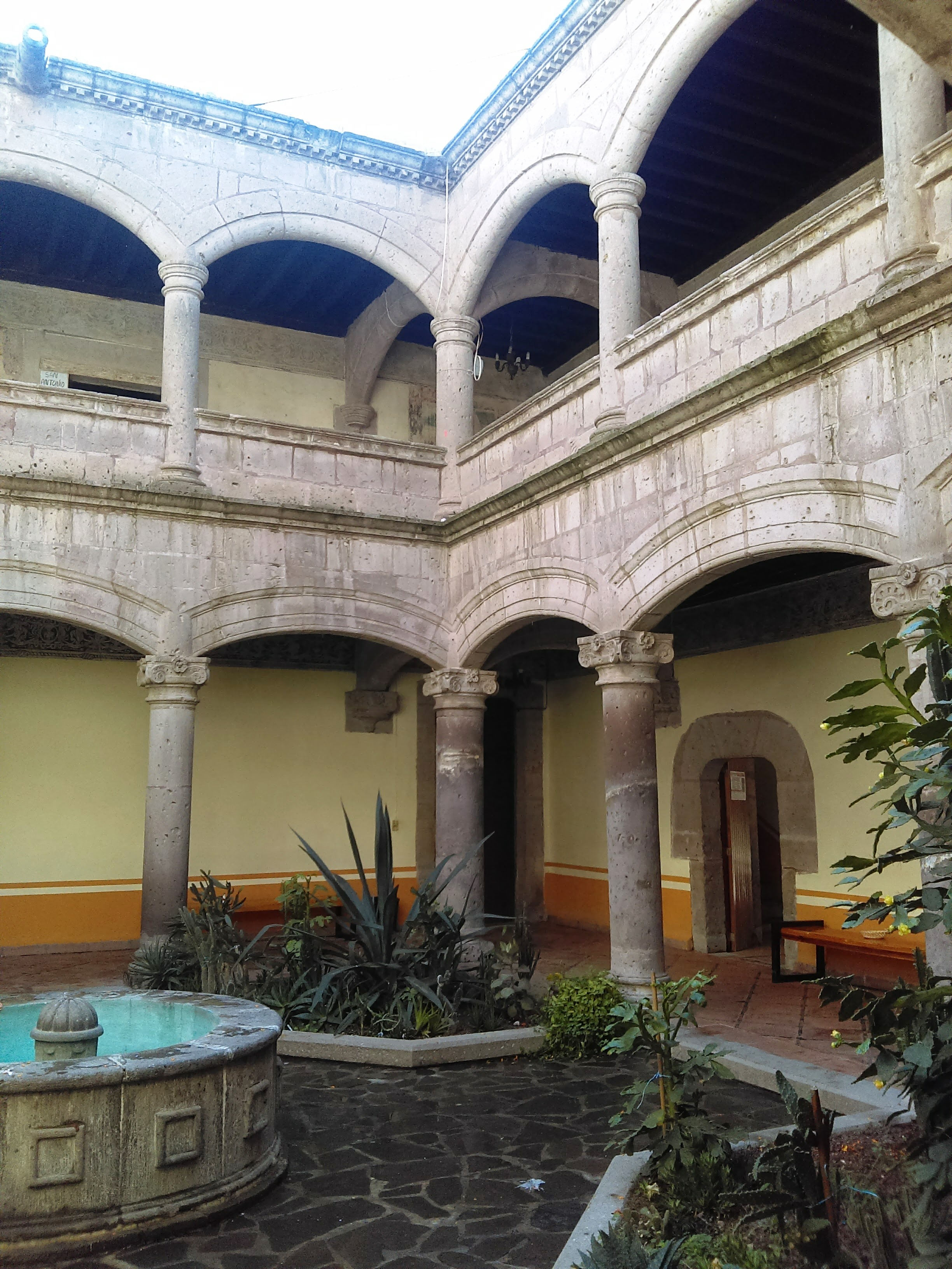 Templo y exconvento de San Francisco en Tepeji del Río, Hidalgo (México).